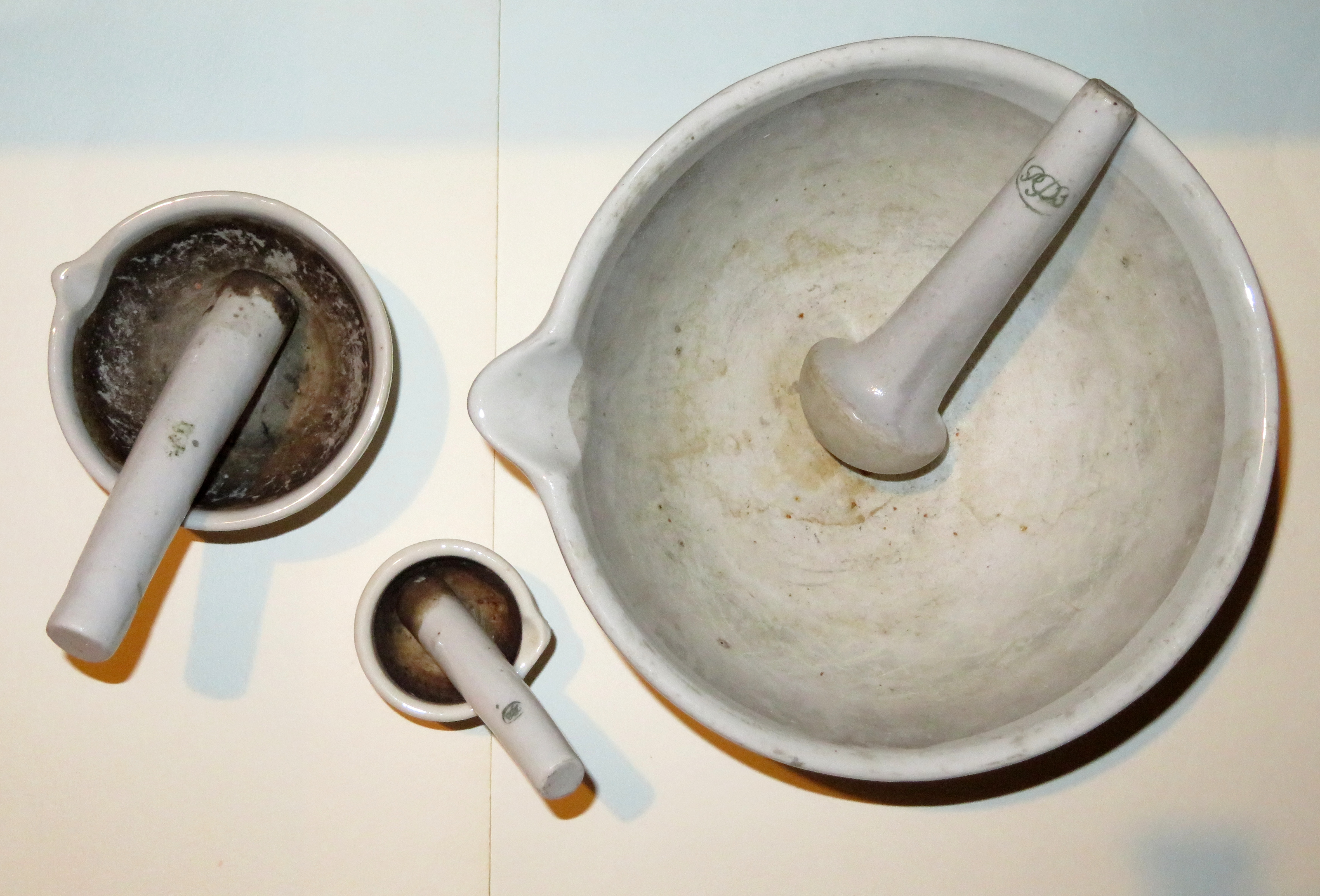 dažādas porcelāna piestas